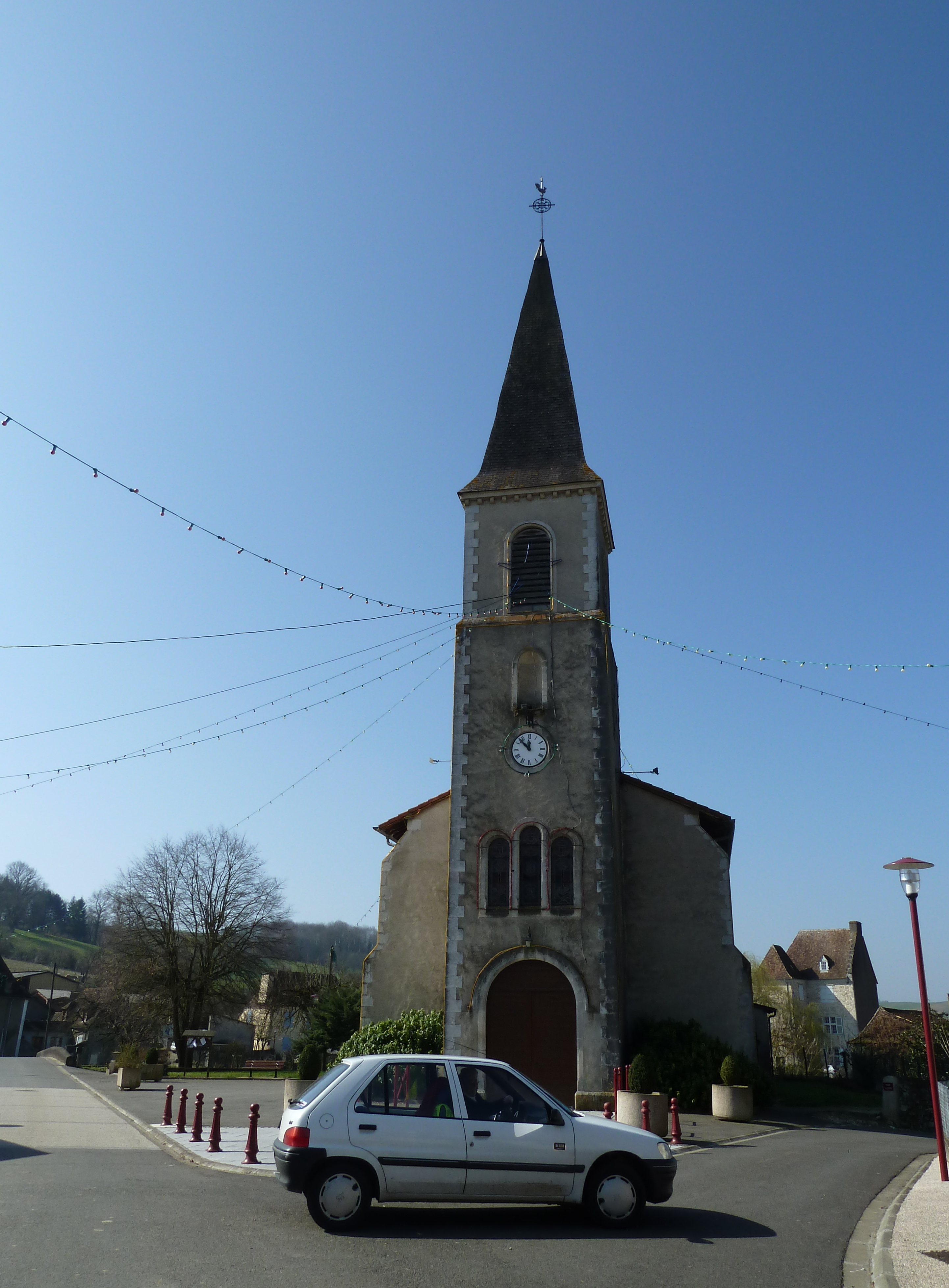 Église de Bérenx